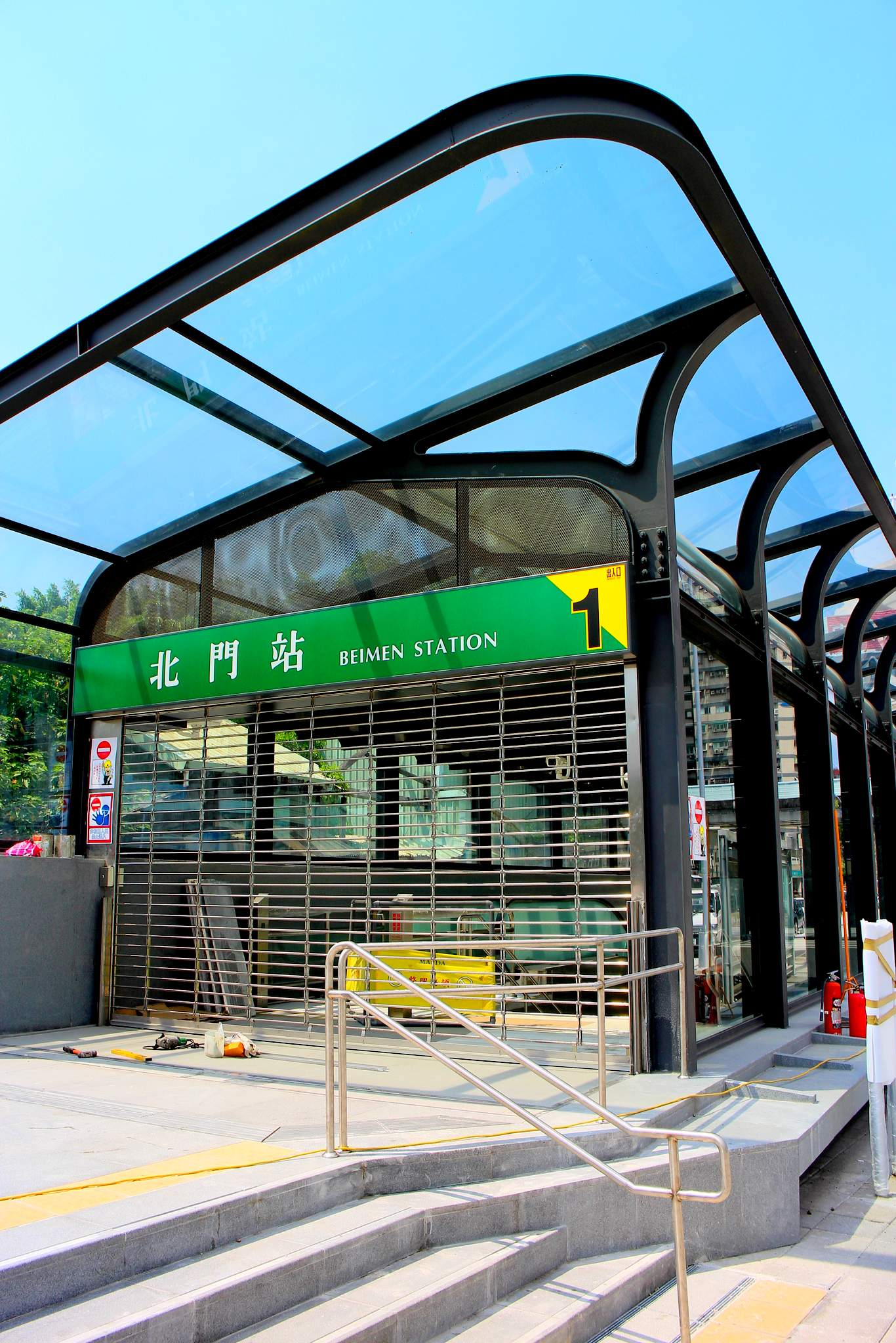 中文（台灣）: 台北捷運松山線北門站一號出口通車前